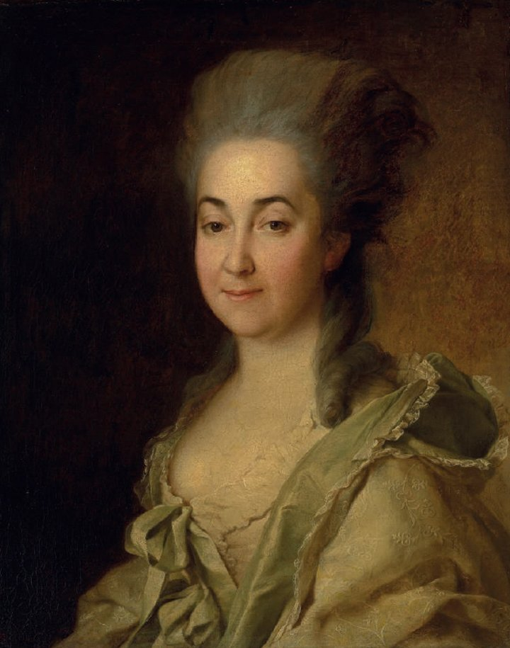 Агафоклея Александровна Полторацкая, ур. Шишкова (29.06.1737-12.10.1822), была замужем за Марком Федоровичем Полторацким.